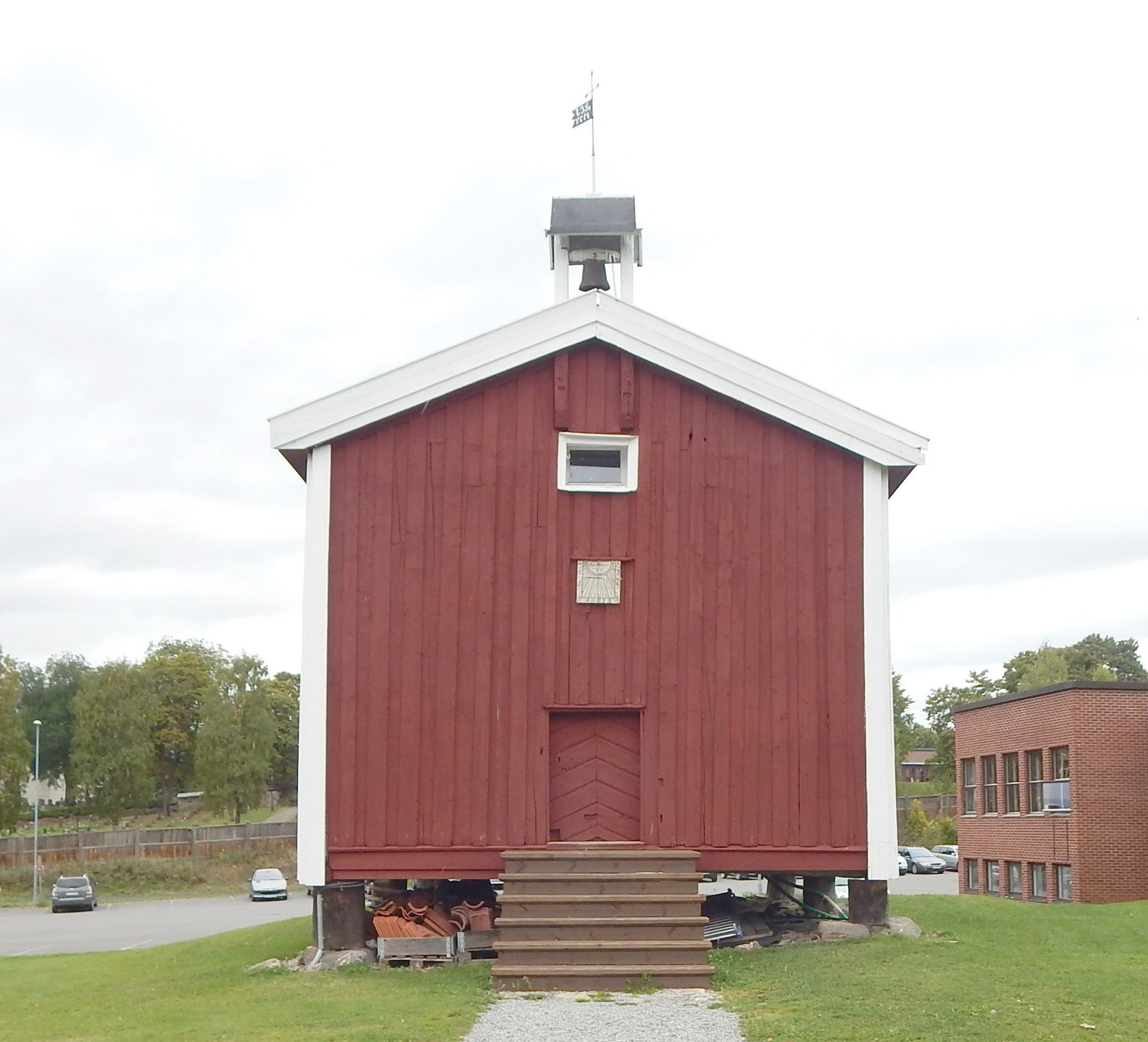 Fredet stabbur på Vang prestegård ved Ridabu, nå på området til Toneheim folkehøgskole